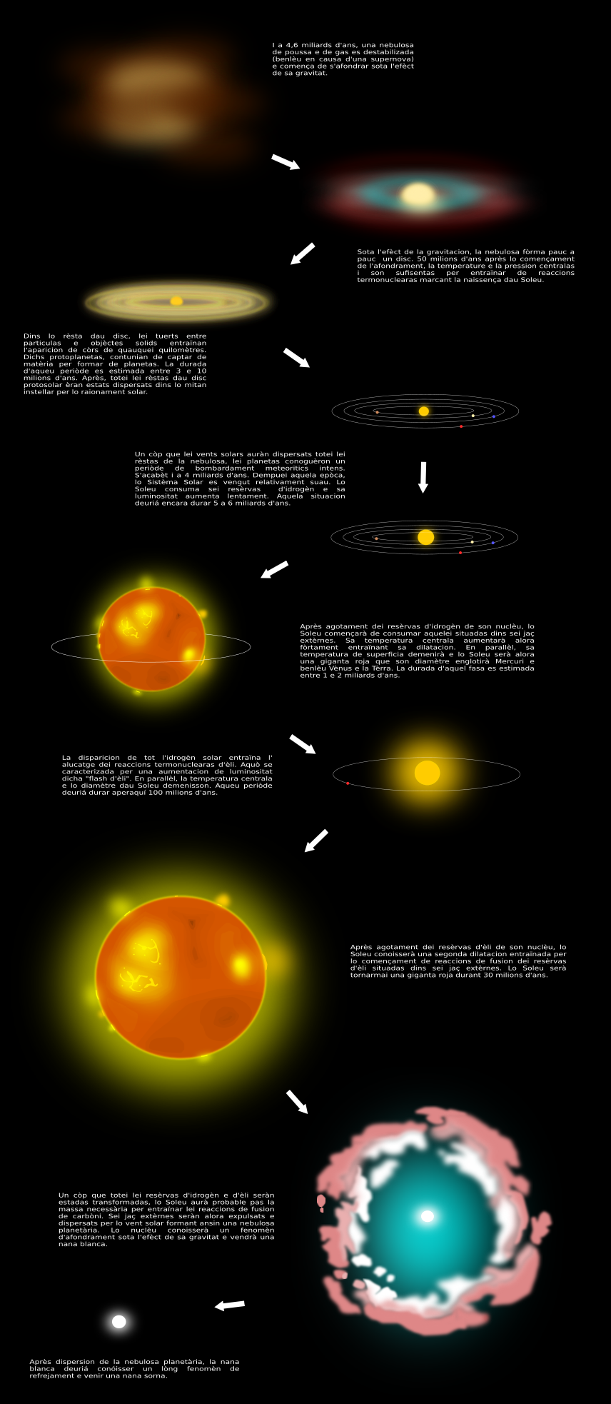 Evolucion dau Sistèma Solar.